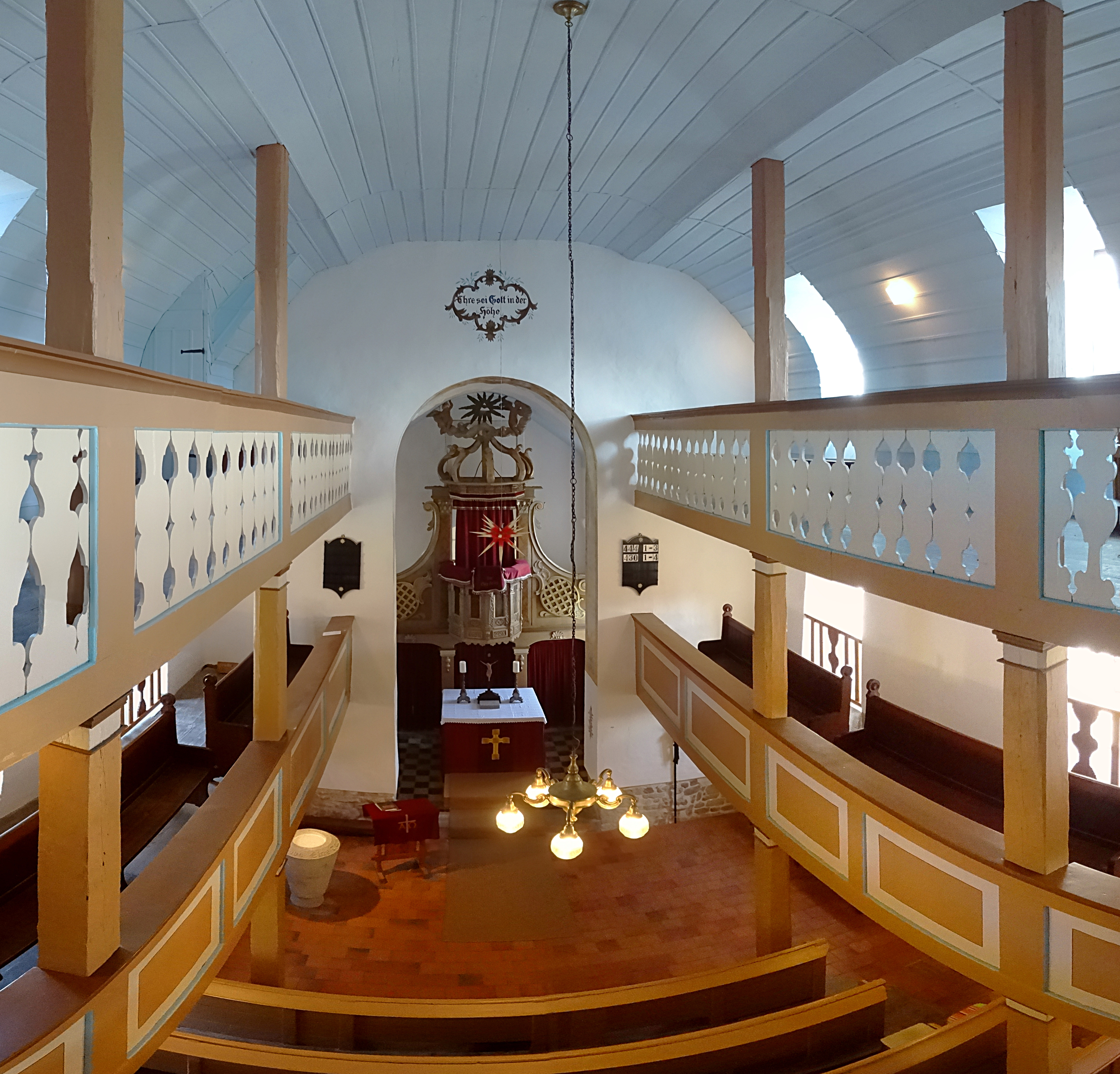 Innenraum Panorama Sulzbach St. Petrus